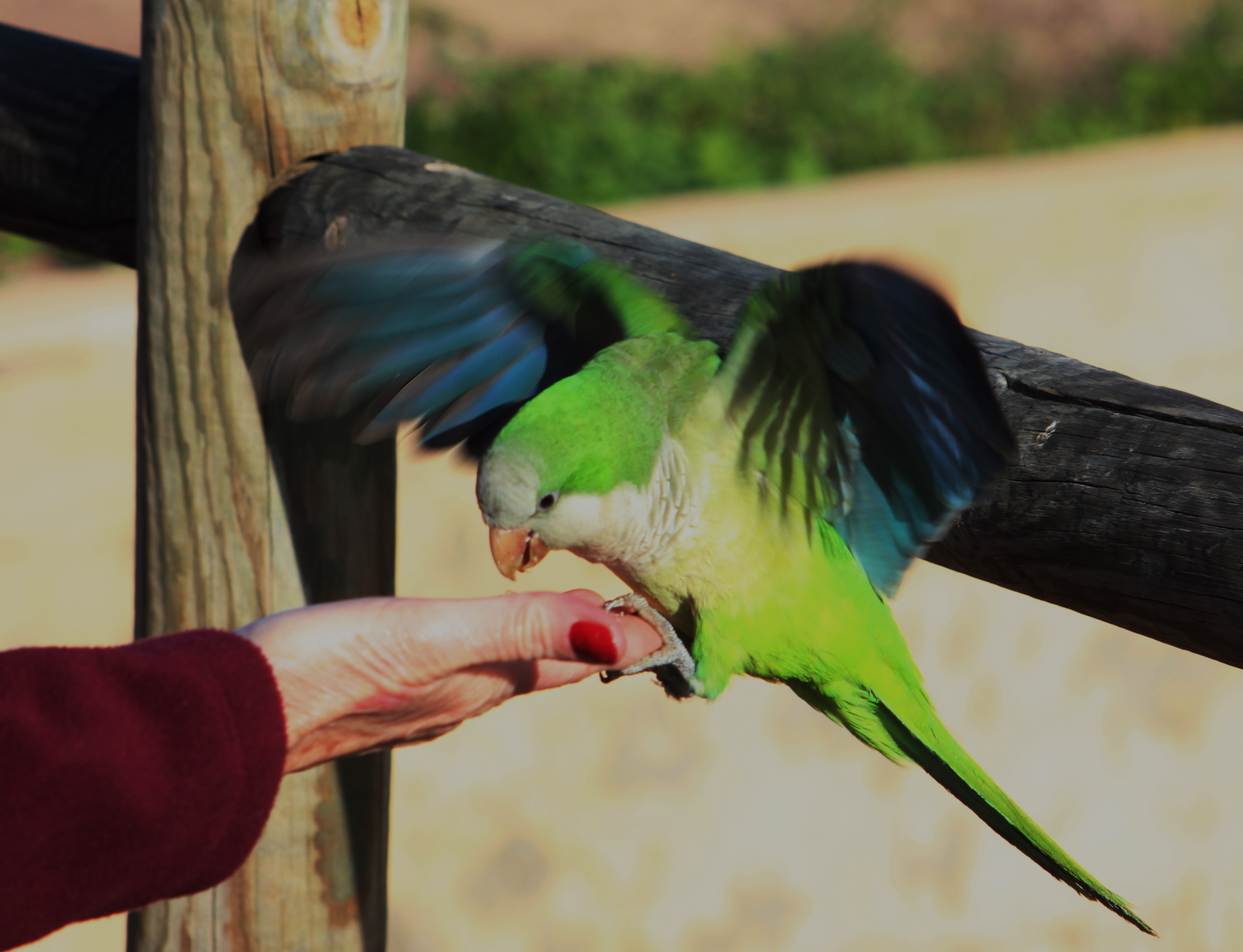 Mönchssittich (Myiopsitta monachus) am Strand von Faro de Morro Jable auf der Insel Fuerteventura. Wildvogel nimmt Nahrung aus der Hand.